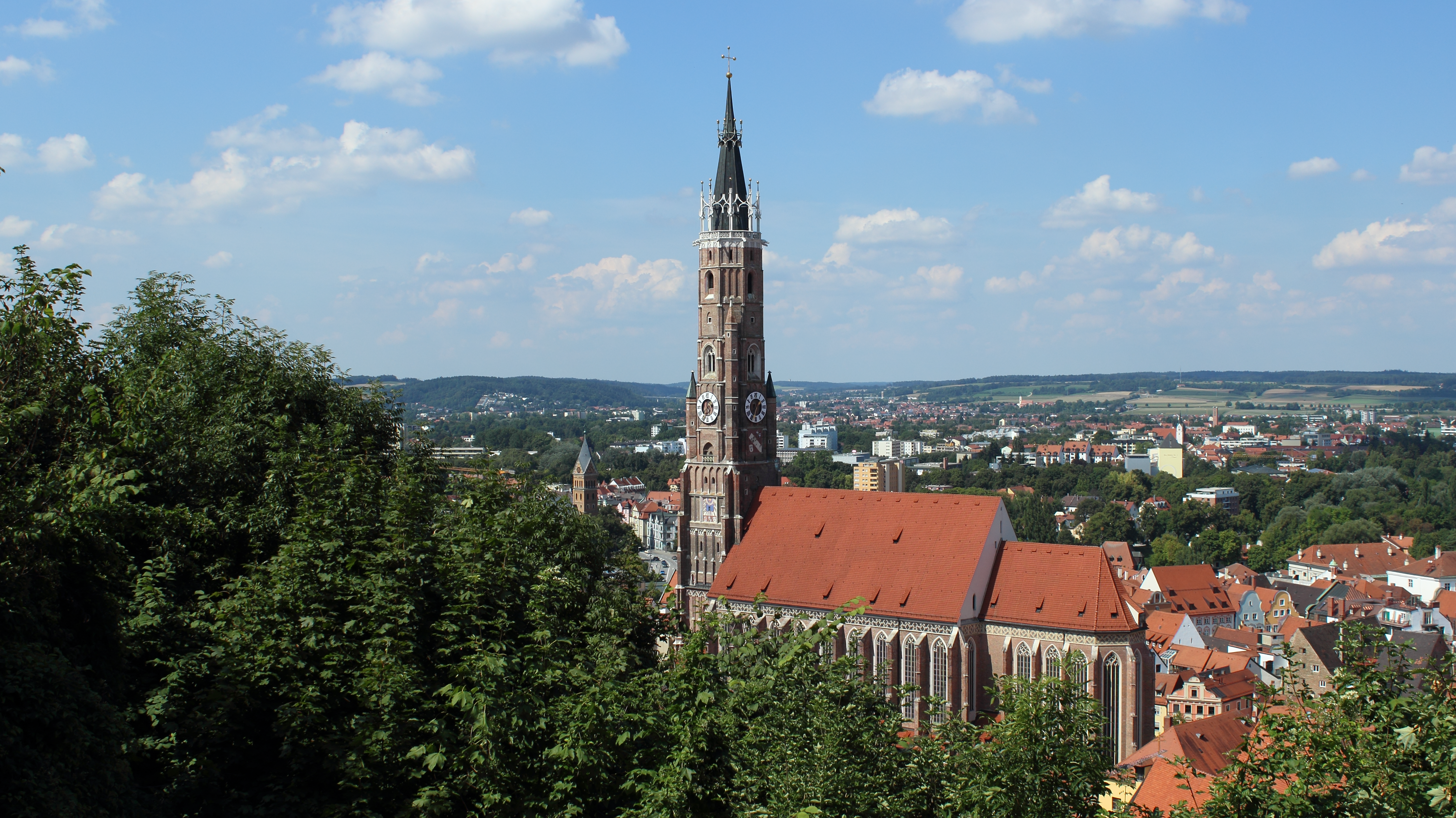 Die Kirche St. Martin vom Aussichtspunkt "Schanzl" aus gesehen.